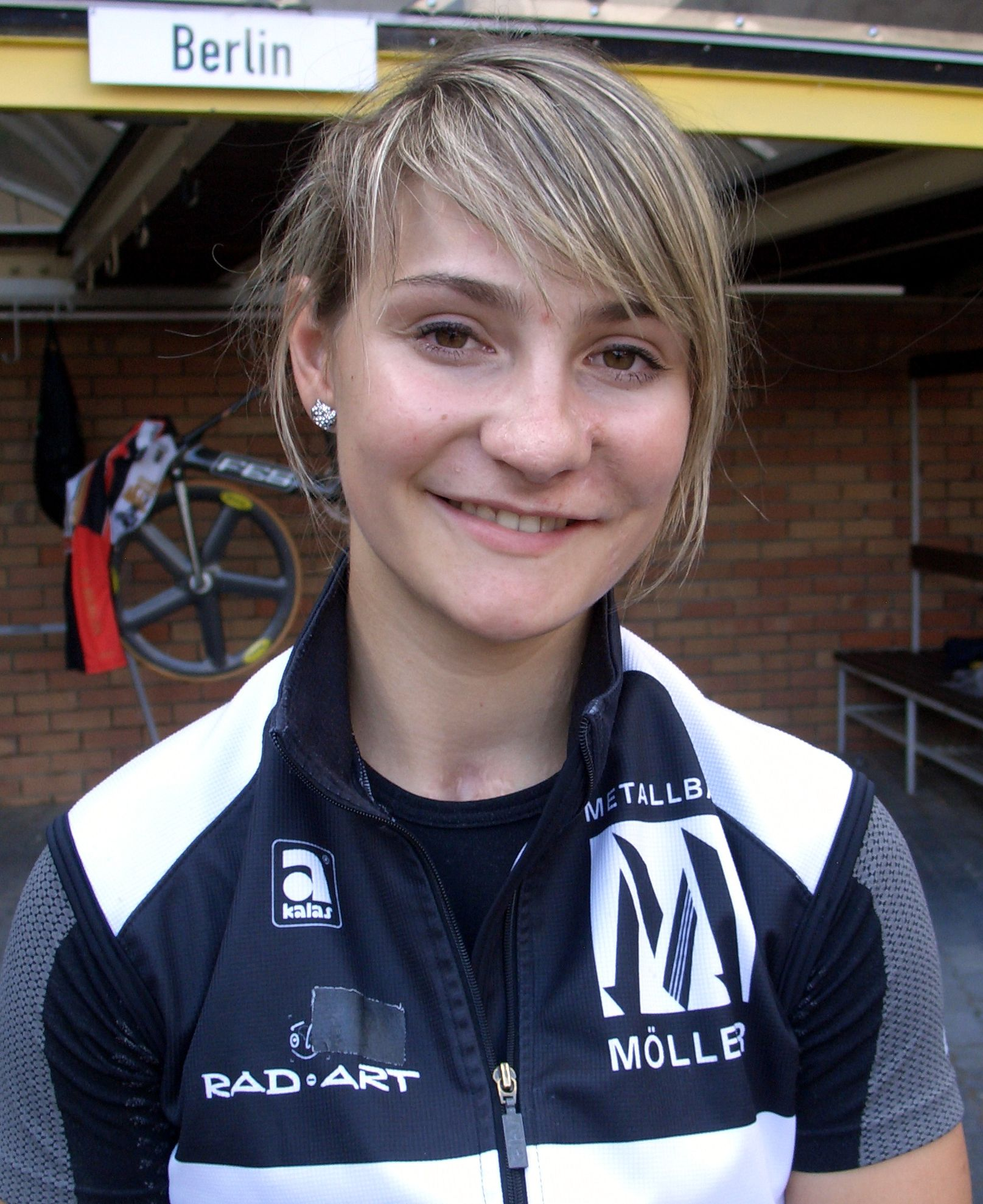 Radsportlerin Kristina Vogel